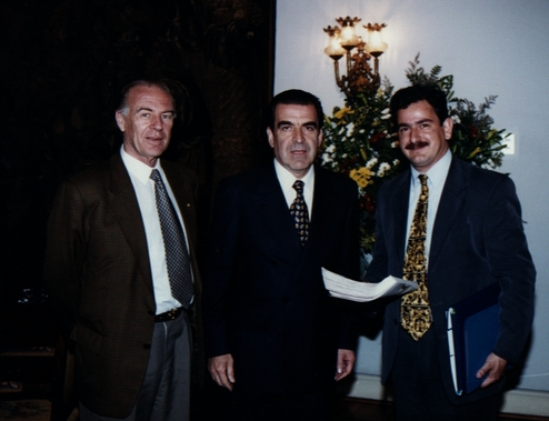 Fotografía en la que aparece Eduardo Frei Ruiz Tagle, el alcalde de Carahue y Jorge Lavandero.